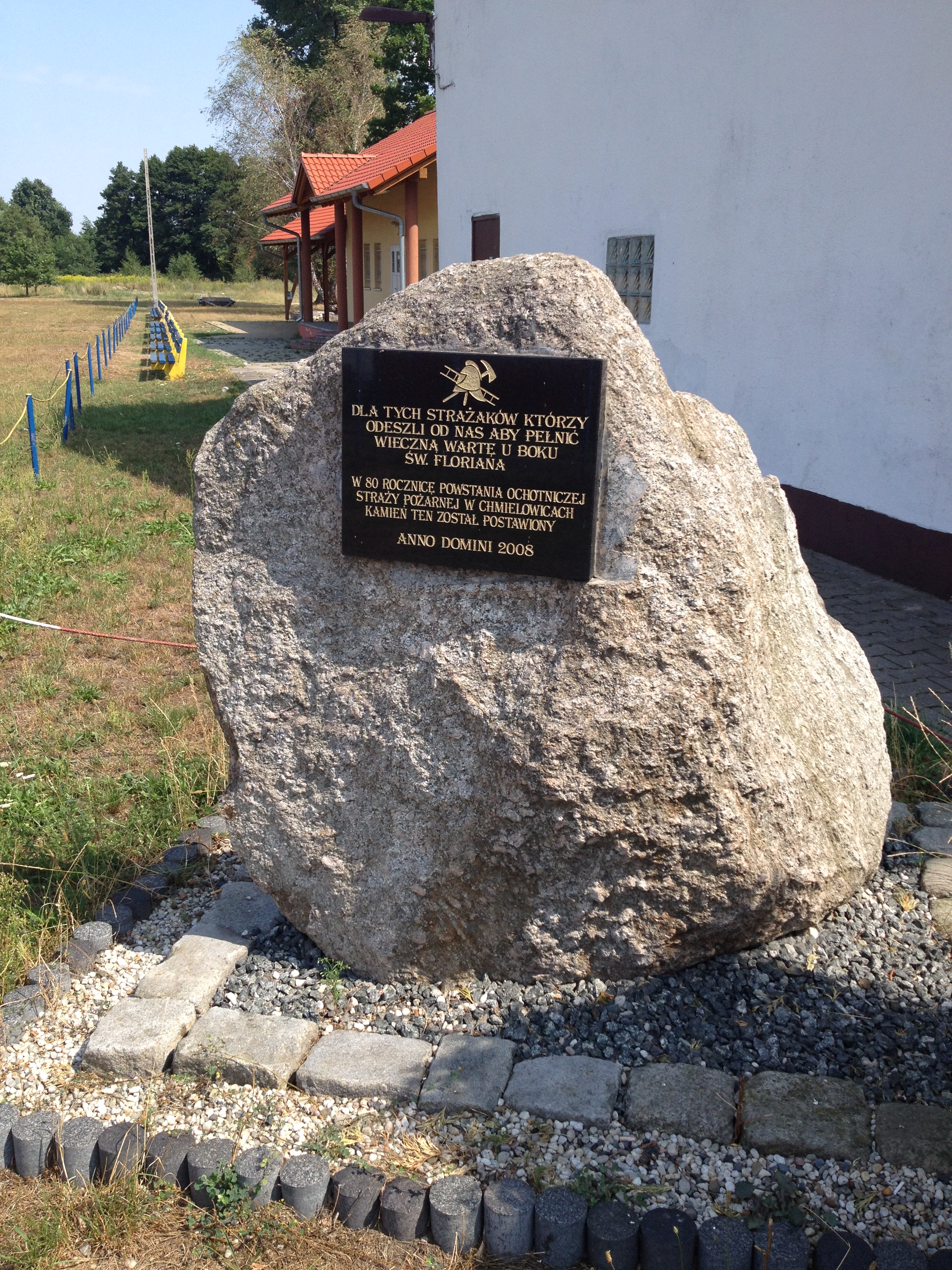 Kamień pamiątkowy przy remizie wystawiony w 80. rocznicę powstania OSP Chmielowice w 2008 roku